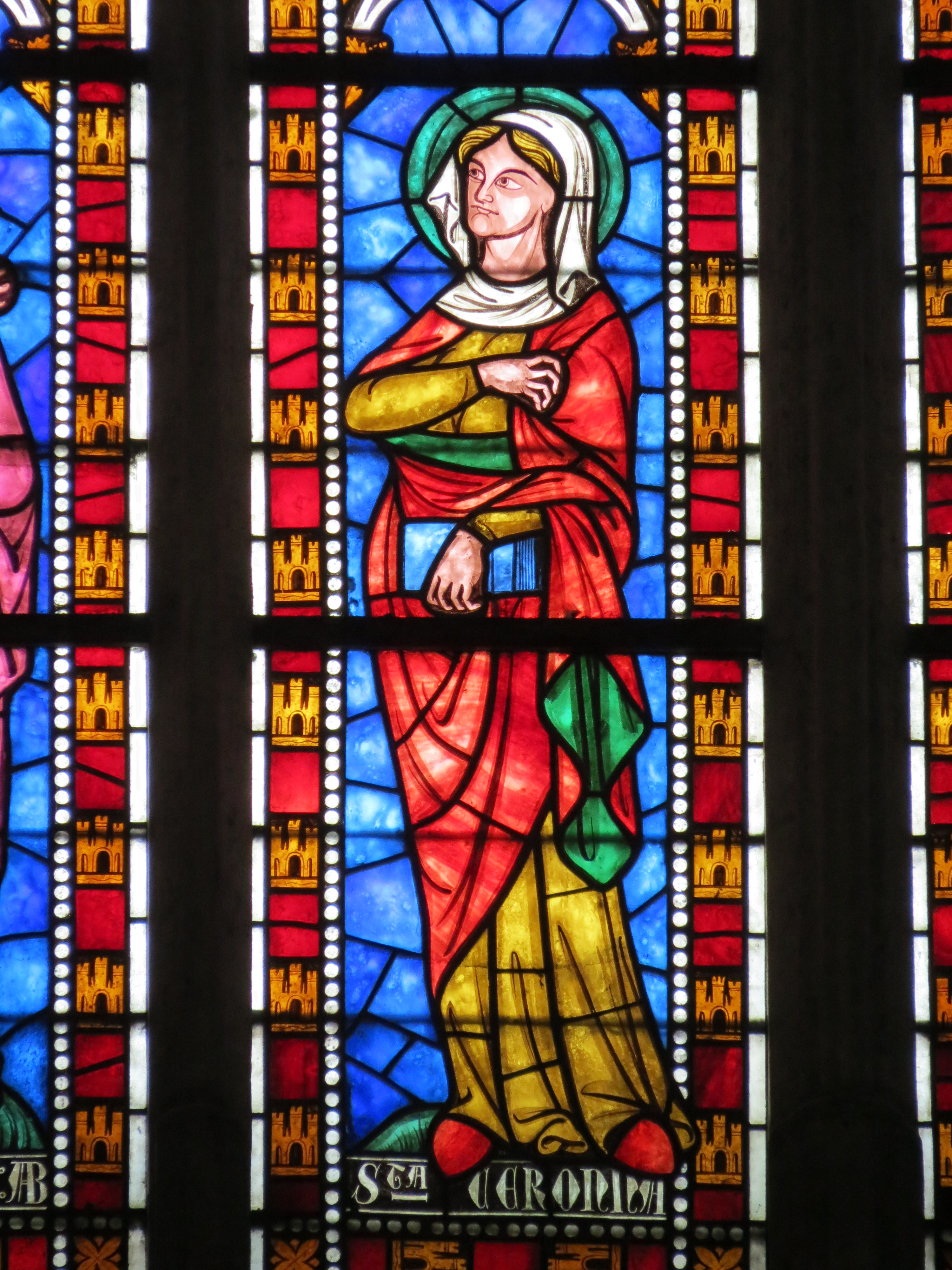 Vitrail de la rose nord représentant Sainte Céronne.